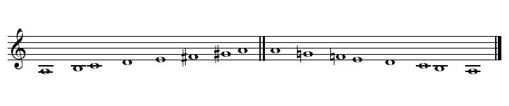 Description : Mode mineur mélodique Source : Personnelle Licence : GFDL